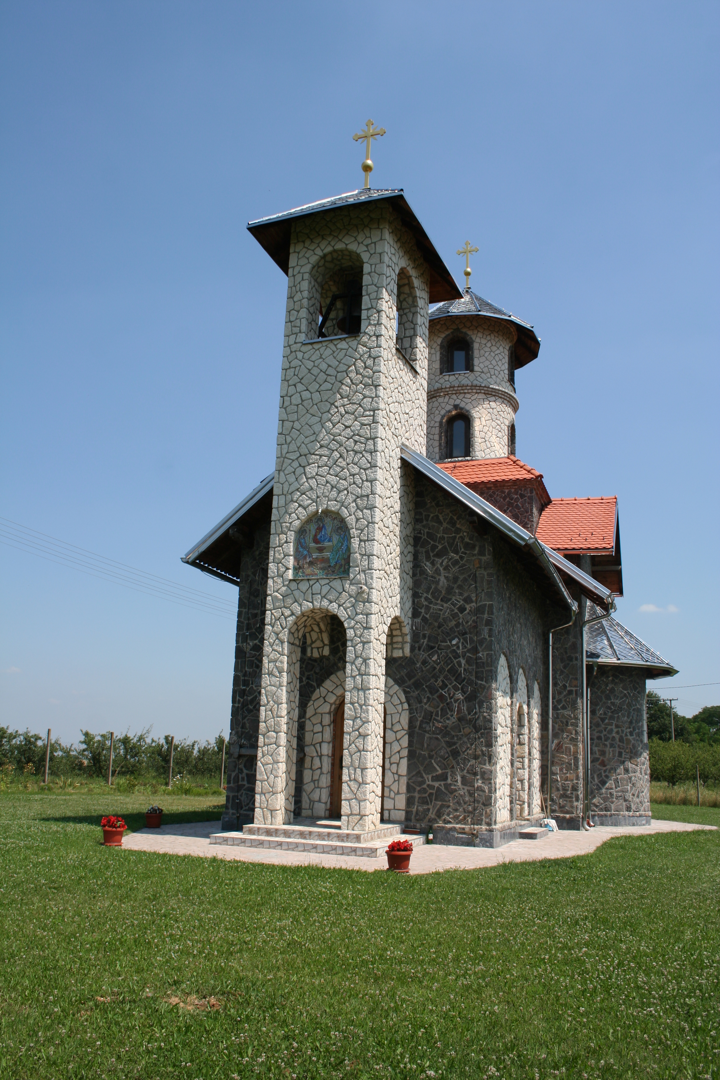 Crkva Svete Trojice, Bukor